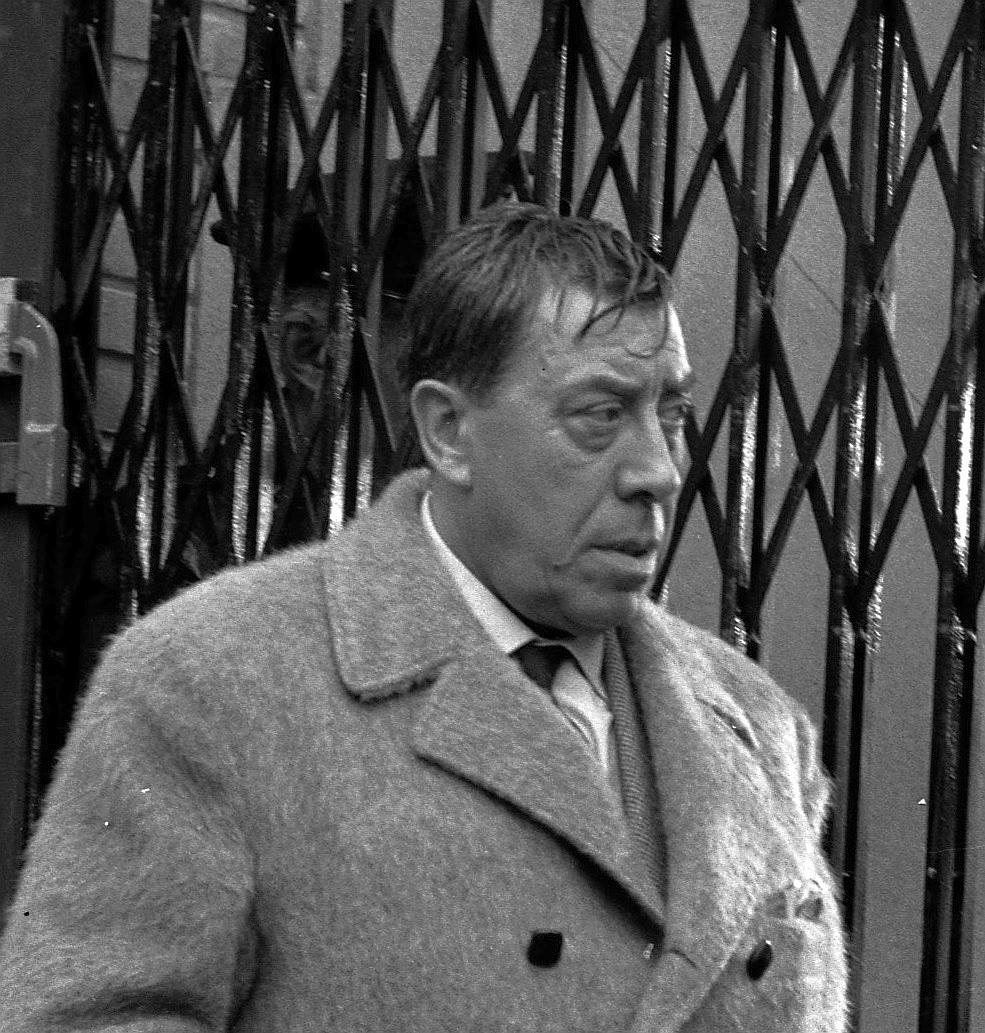 Quartier Saint-Sernin. Le 2 novembre 1965. L'acteur Fernandel lors du tournage du film "La Bourse ou la Vie" de Jean Pierre Mocky Observation: Tournage du film "La Bourse ou la Vie" de Jean Pierre Mocky, dans le quartier de St Sernin, et devant le musée des Augustins.